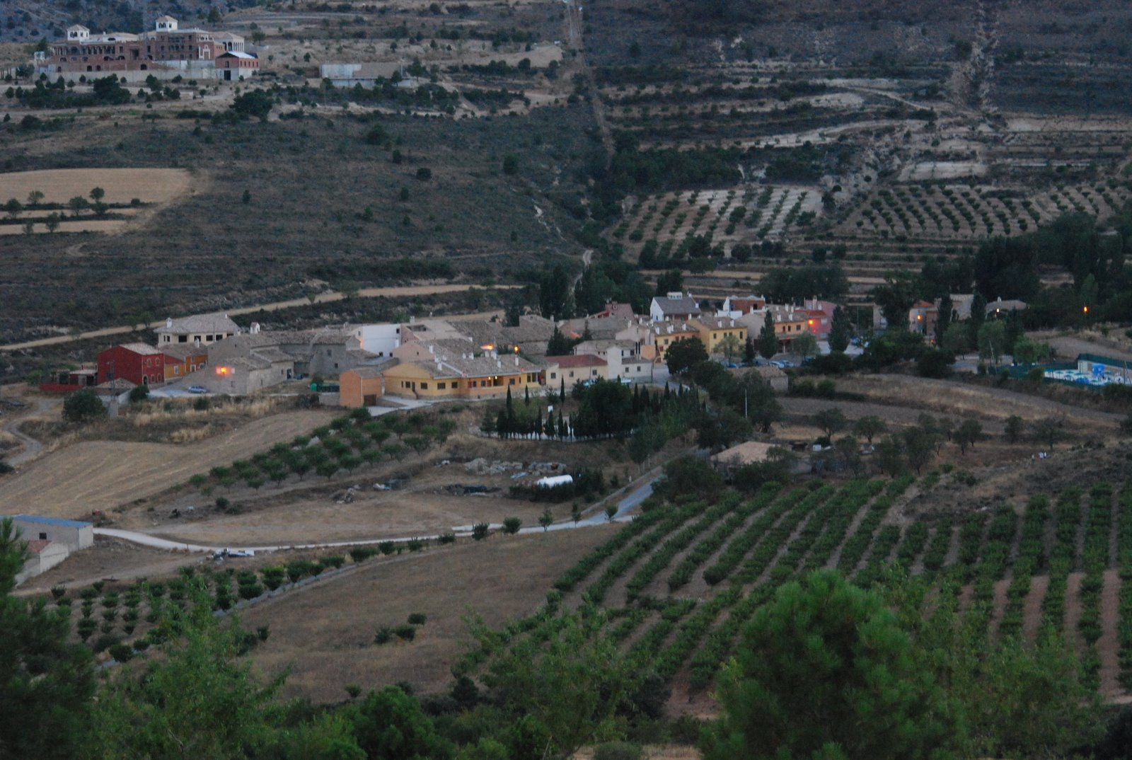 Fotografía de la población de Inazares.